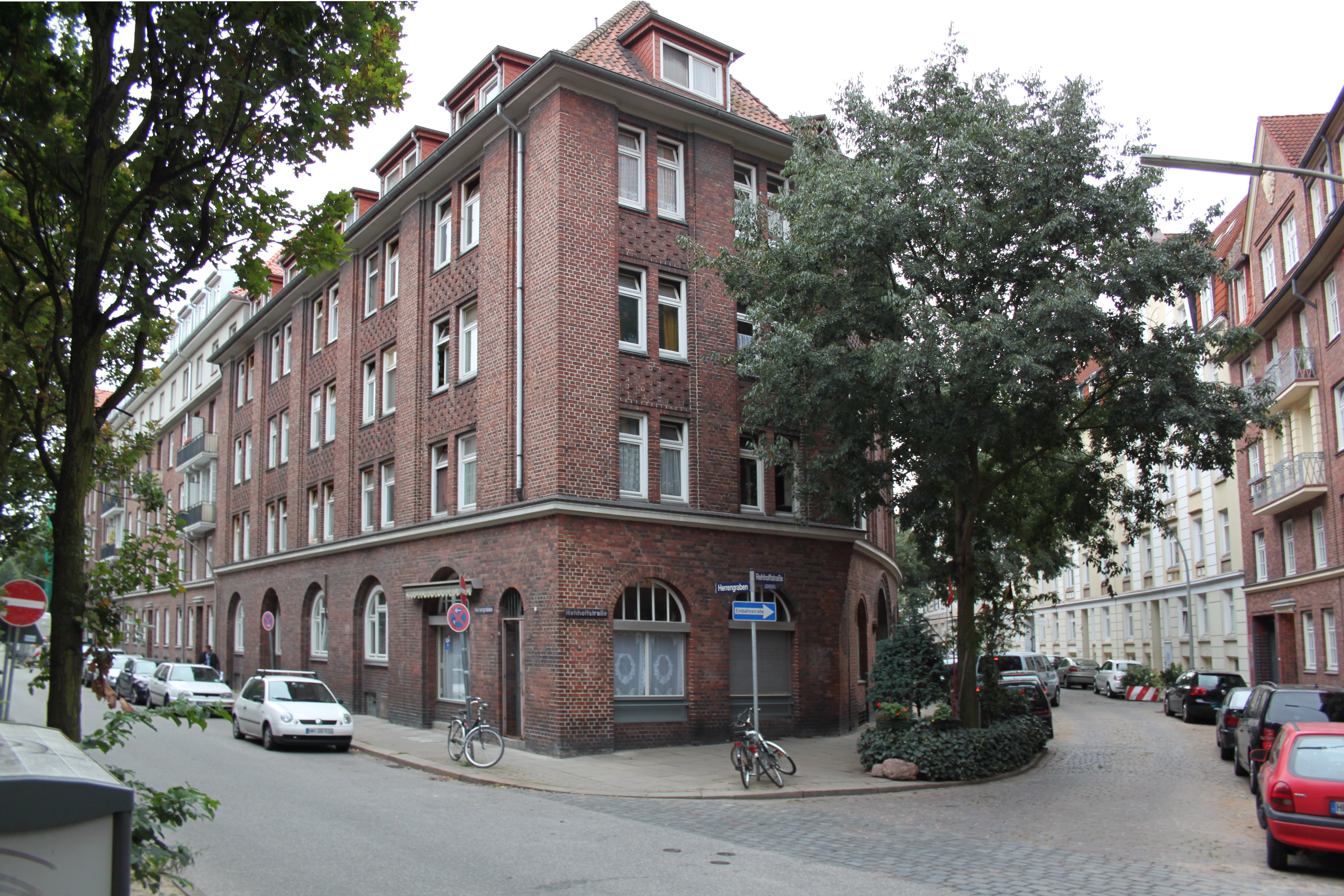 Ansicht des Ledigenheims Hamburg, Ecke Rehhoffstraße/ Herrengraben